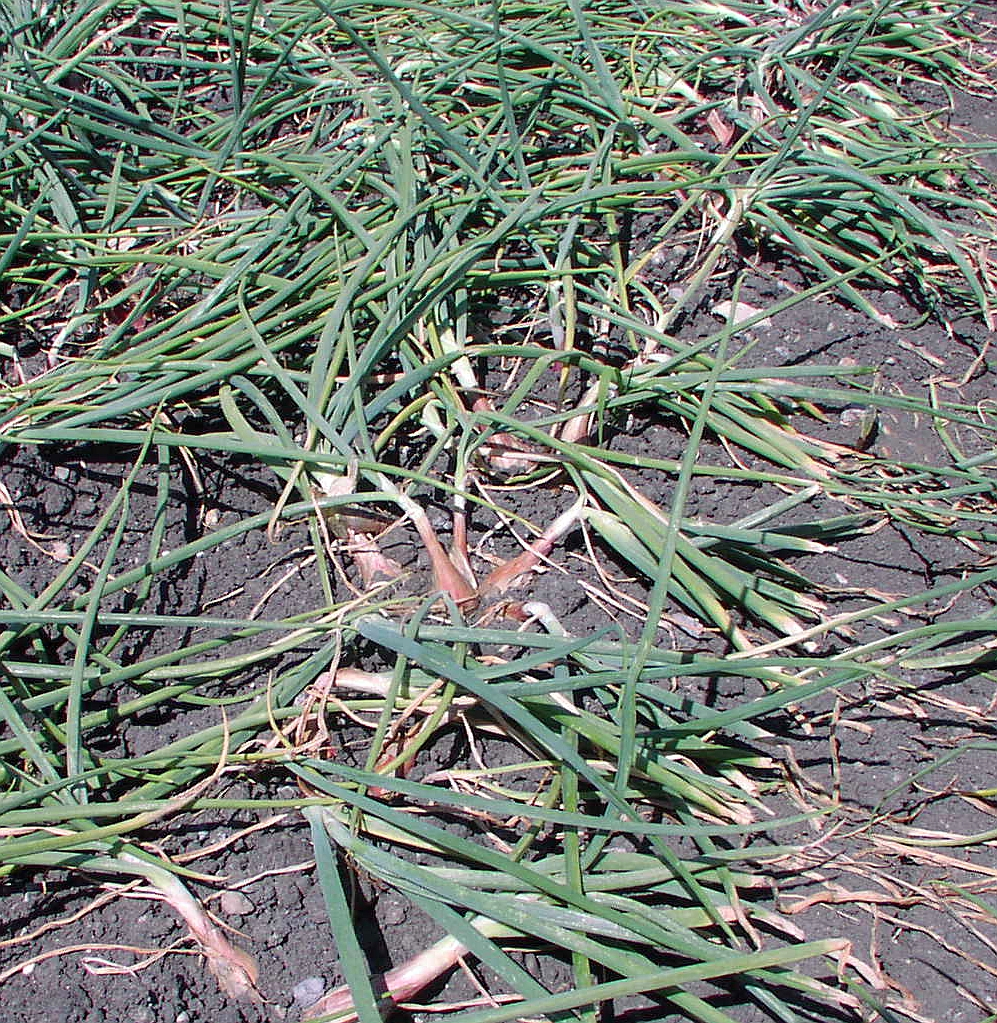 Eschalotte Bestand